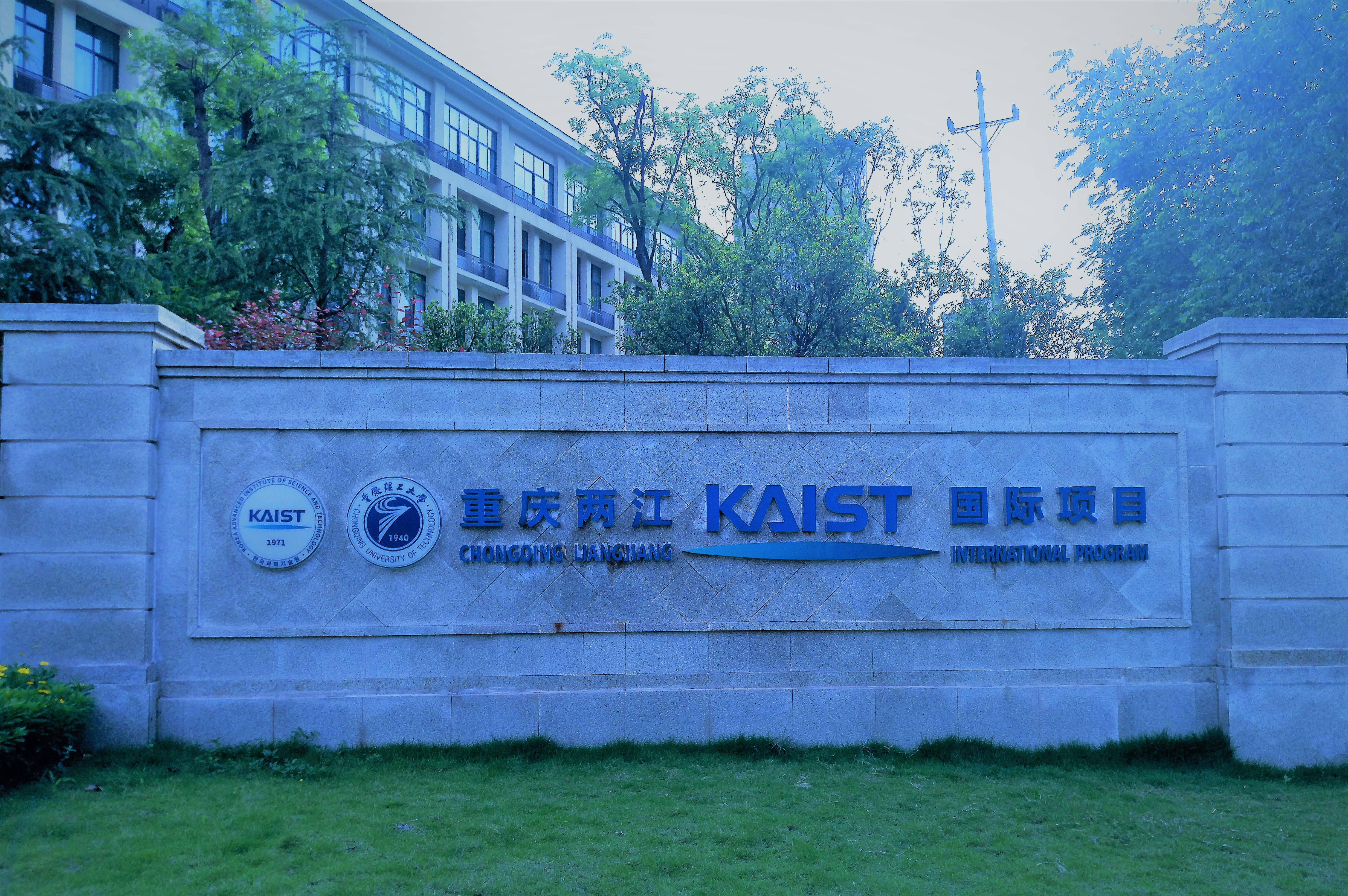 重庆理工大学两江校区大门